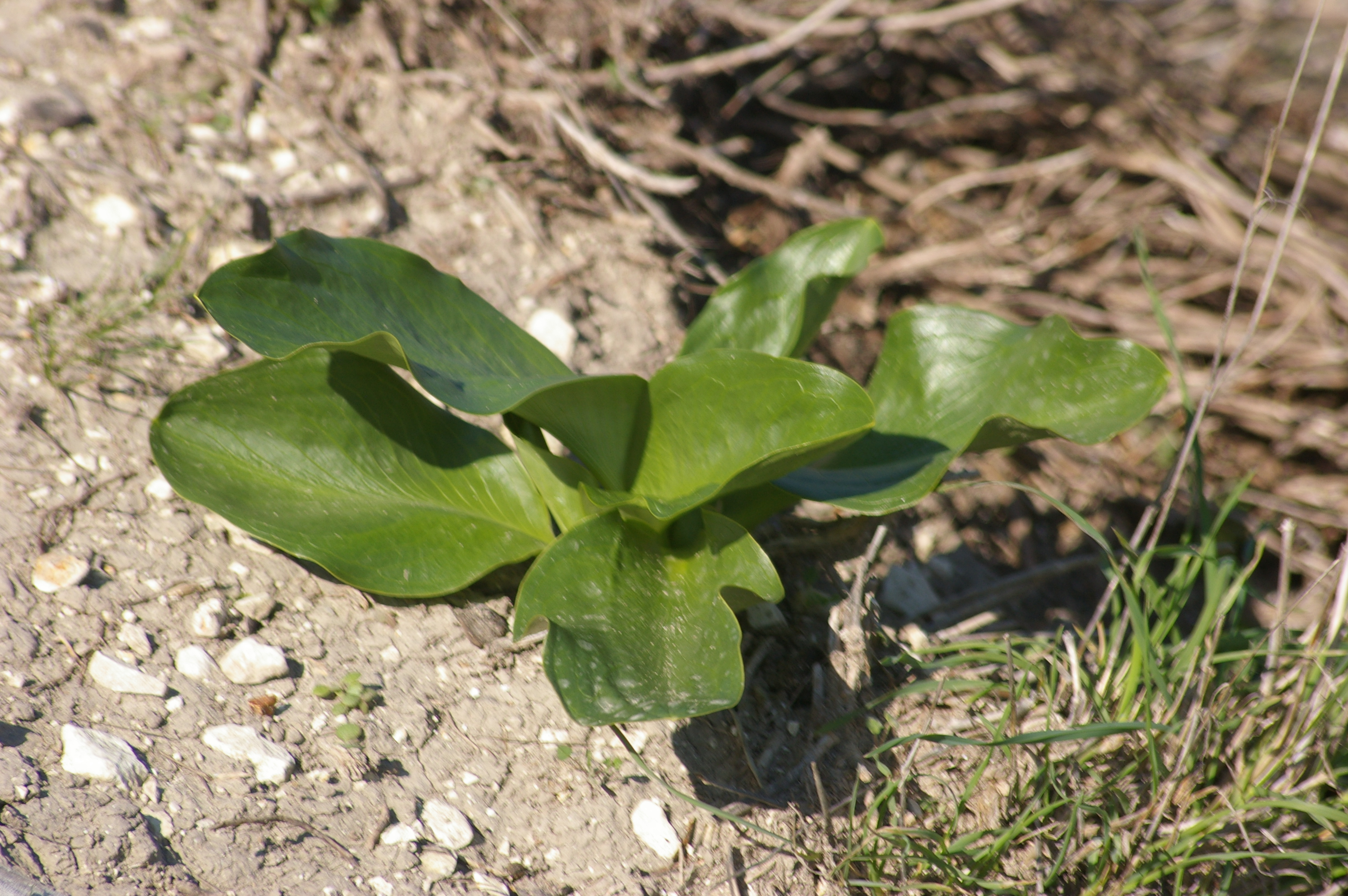 Biarum pyrami - leaves אחילוף הגליל, נחל השנים ליד יקנעם